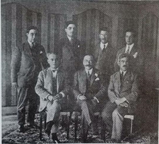 Members of the board of the Jewish-Moroccan newspaper L'Avenir Illustré, 1926.